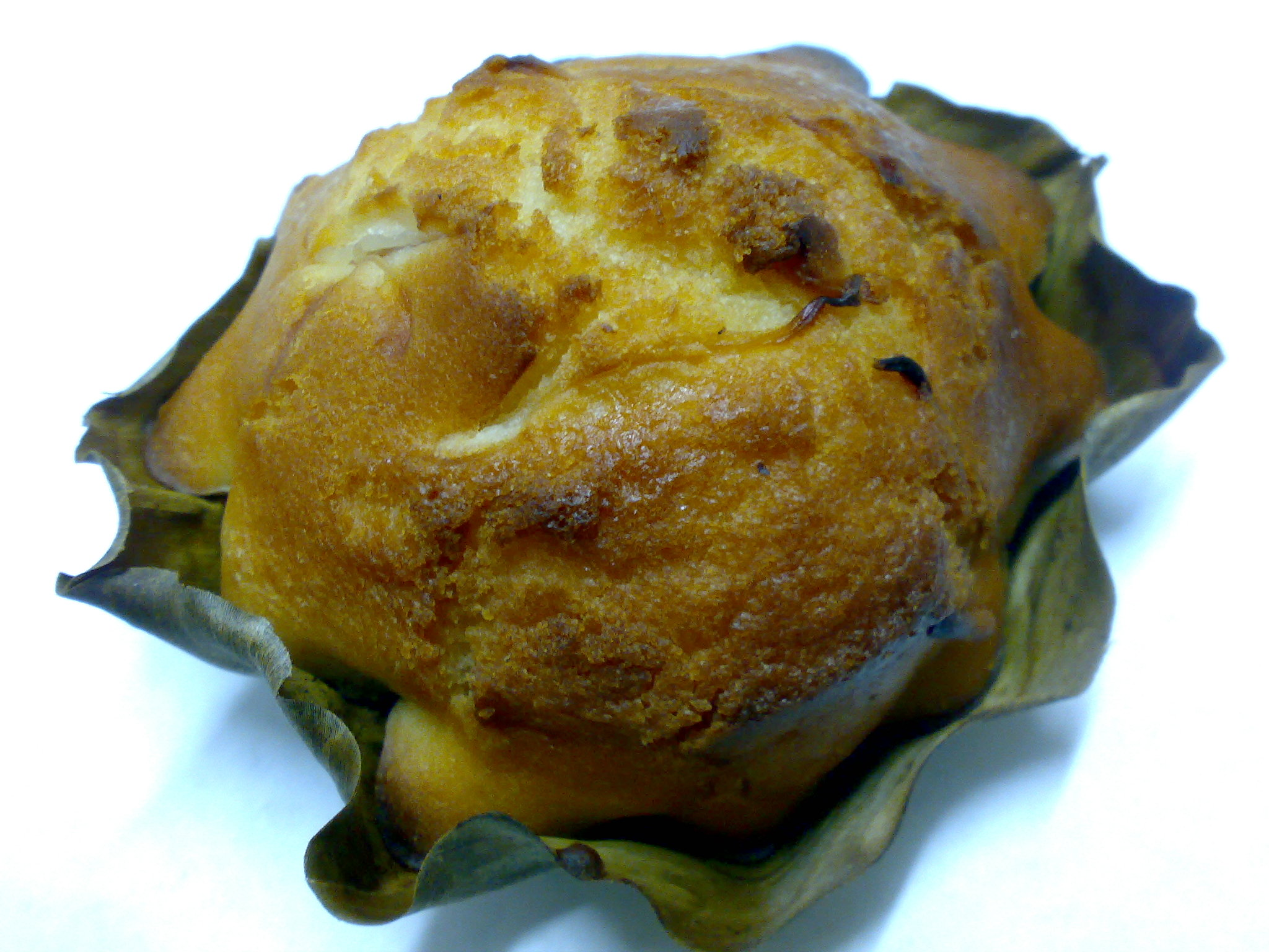 Filipino commercial bibingka in banana leaf liner.